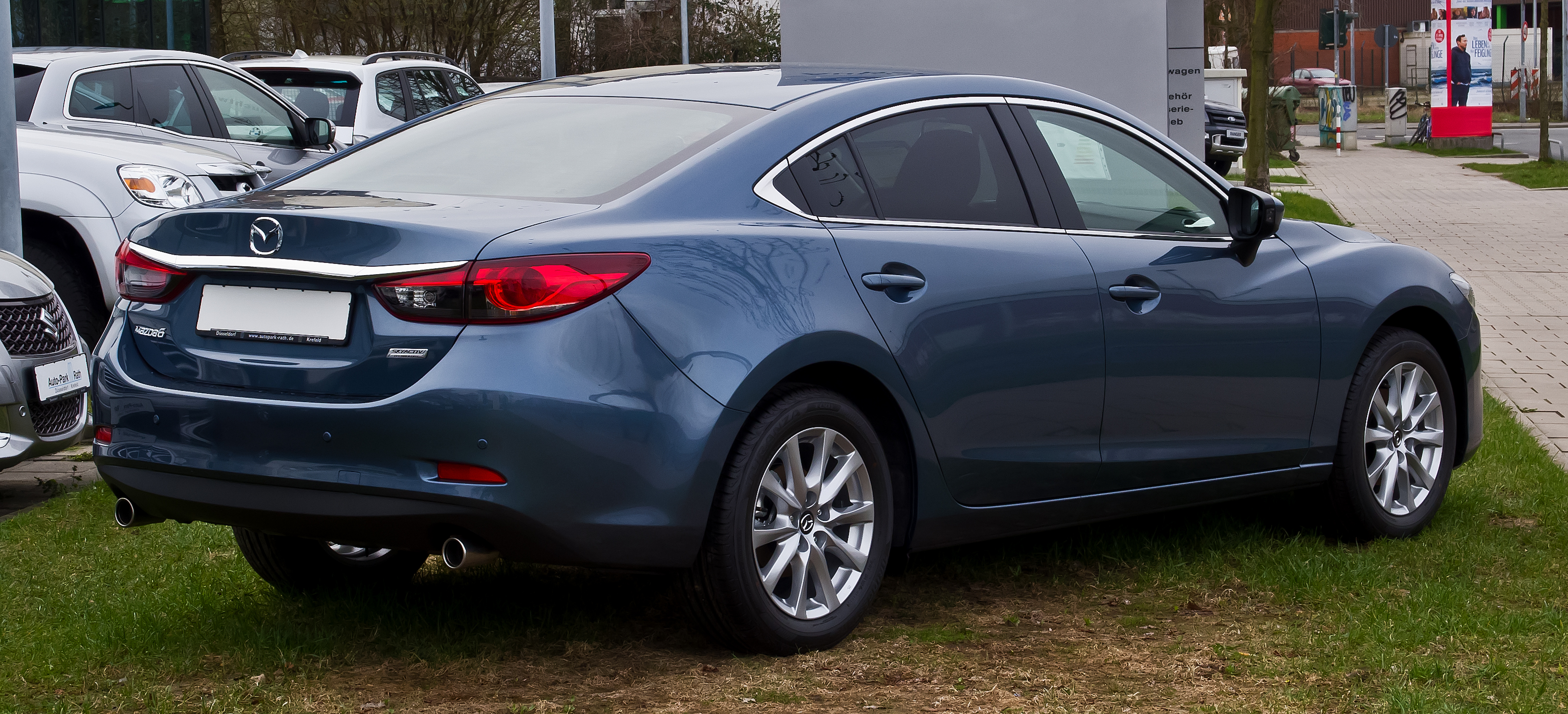 Mazda6 2.0 SKYACTIV-G Center-Line (GJ)